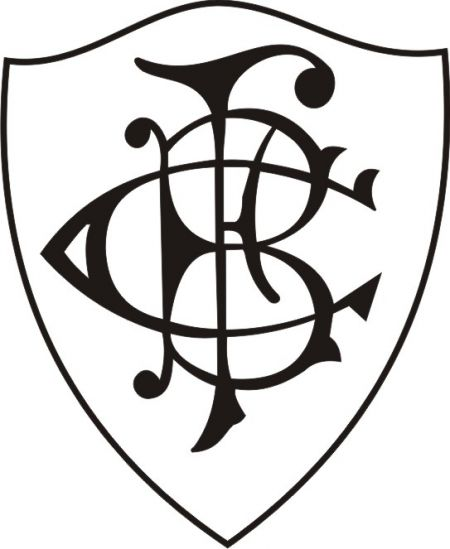 Escudo do Botafogo F.C Hoje Botafogo F.R de 1904